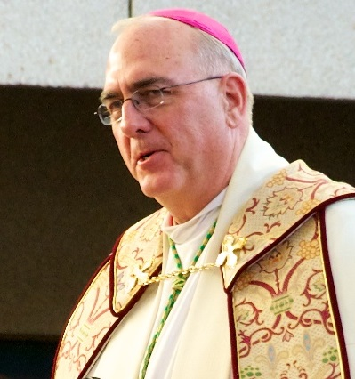 Archbishop Joseph Naumann